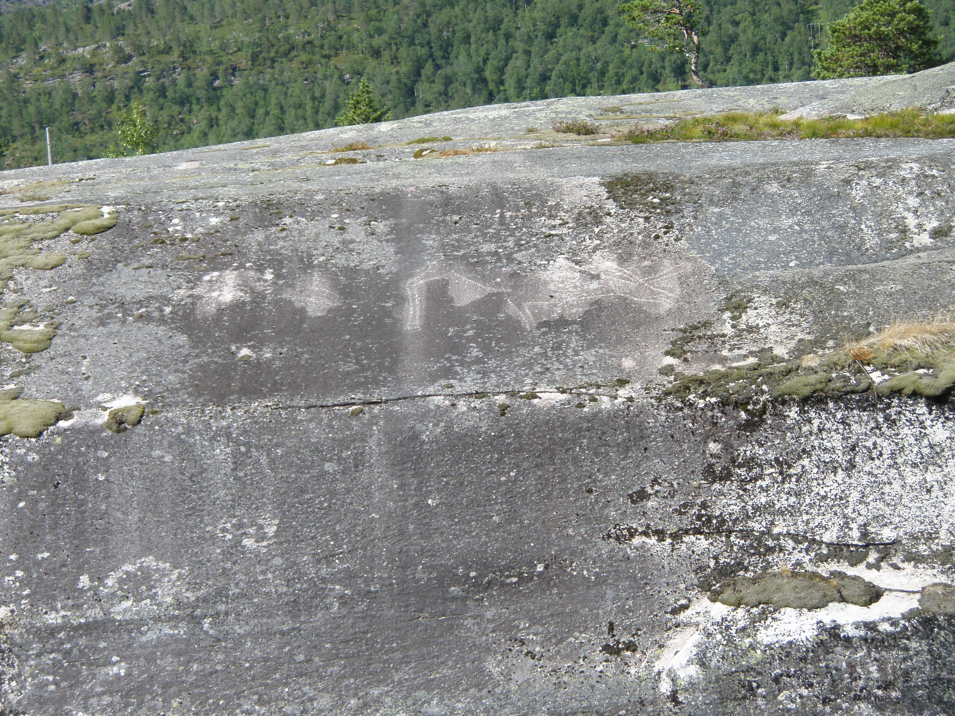 Helleristning fra Nordland,to reinsdyr.